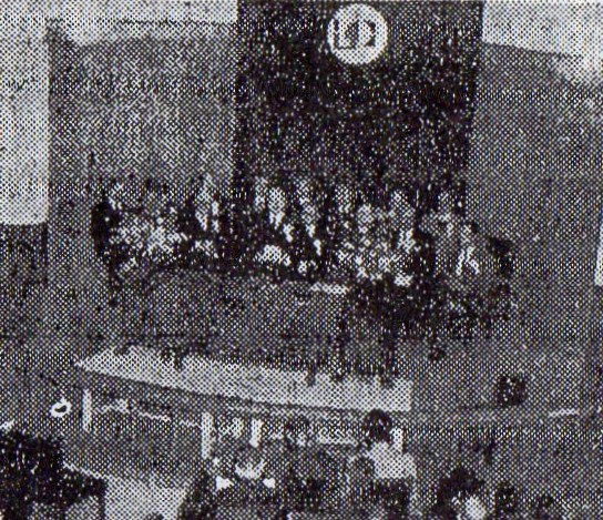 1949年4月15日に行われた口語訳聖書完成感謝を銀座教会を会場として行う。